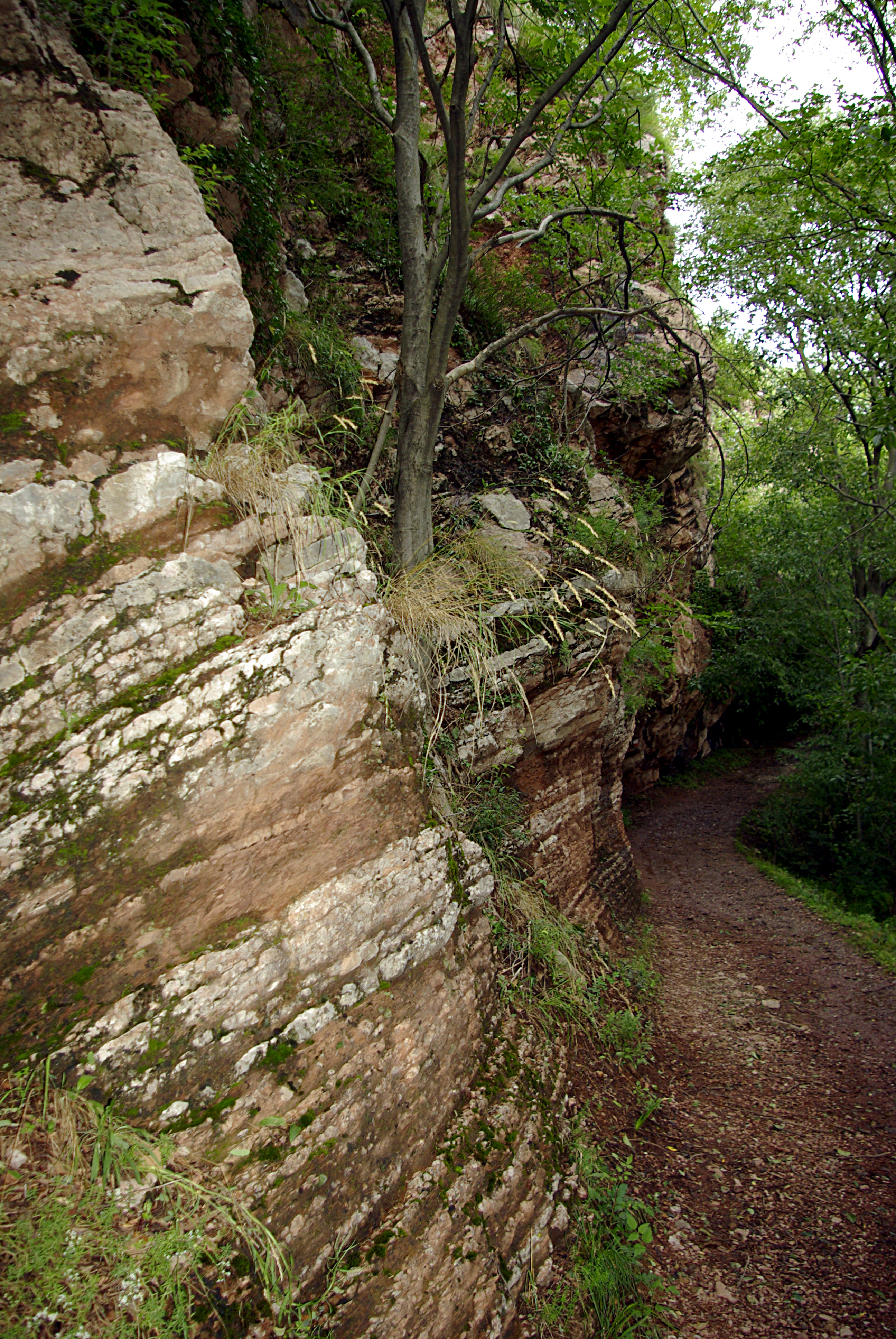 stratificazione a reggipoggio Rosso ammonitico Lomabardo Giurassico